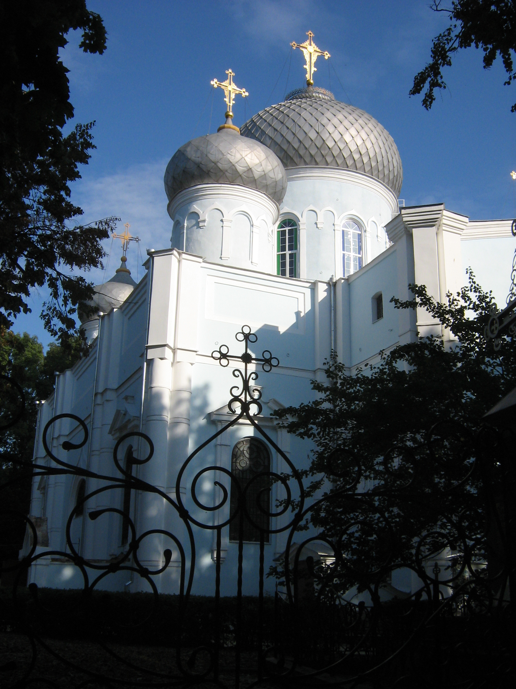 Иоанно-Усекновенский храм в Харькове. Московский патриархат.